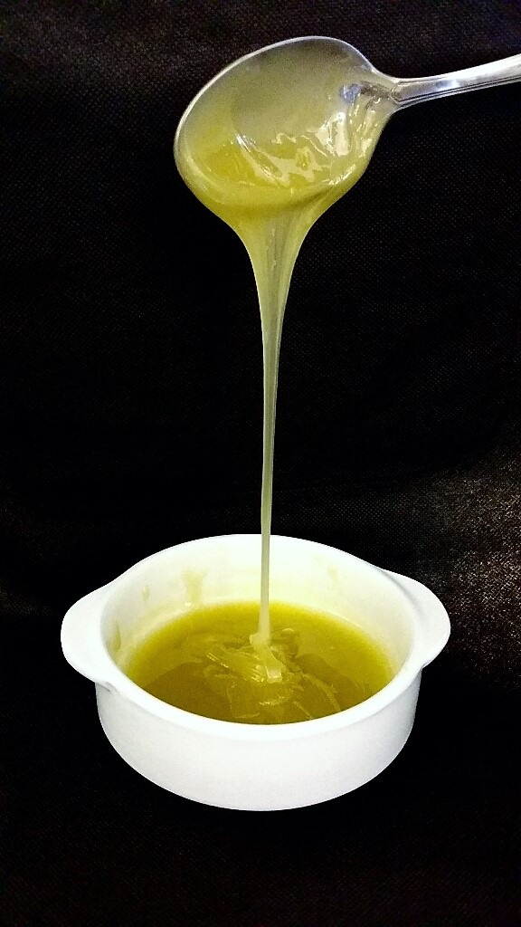 Fotografia de Mel d'oli